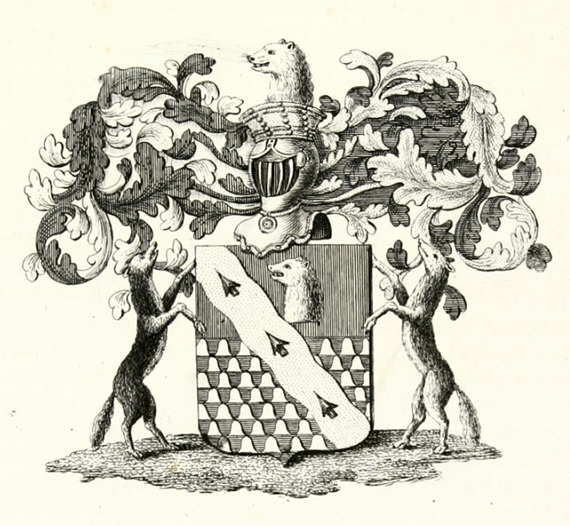 Герб рода Баронов Строгоновых (Строгановых)